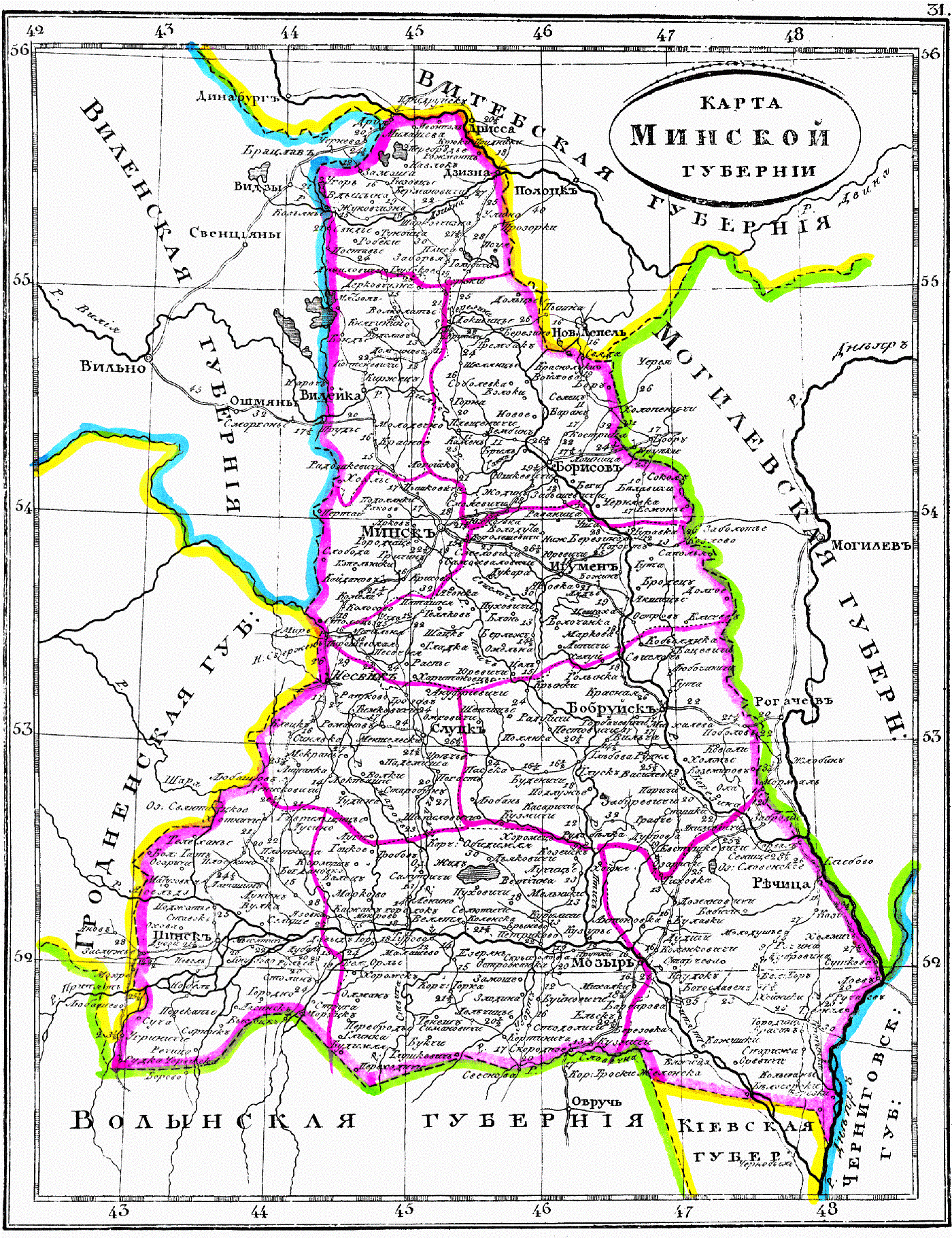 Карта Минской губернии, 1835